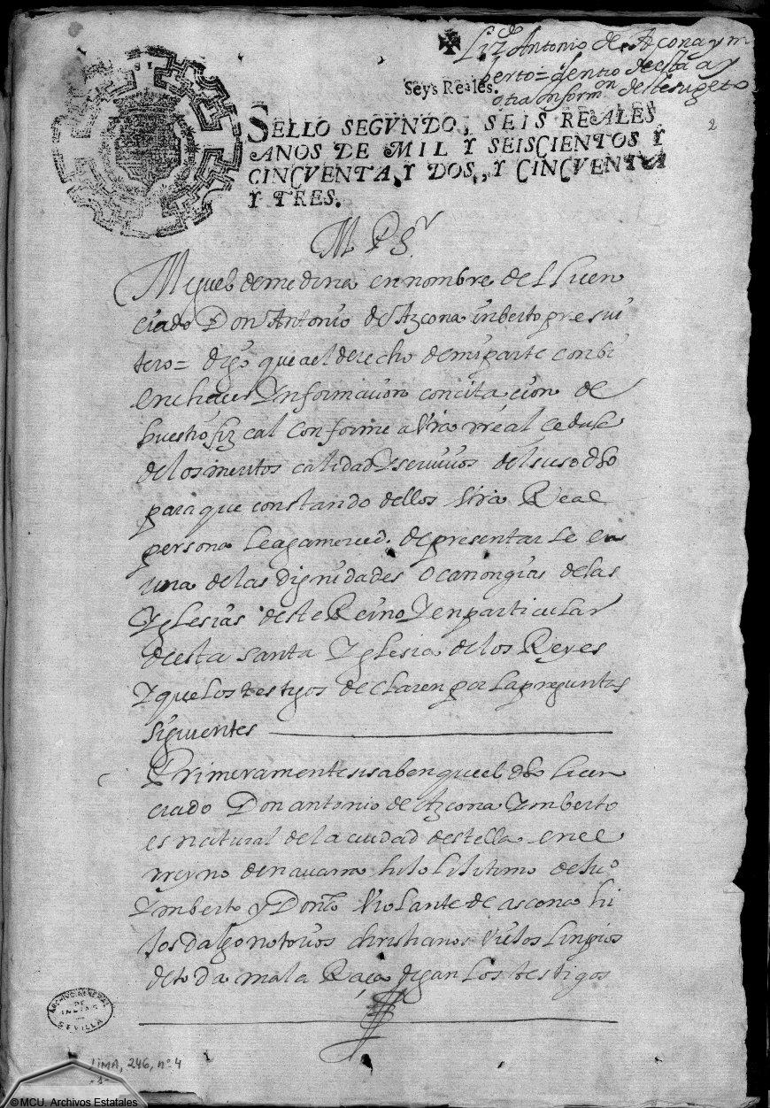 Carátula del legajo de Antonio de Azcona Imberto